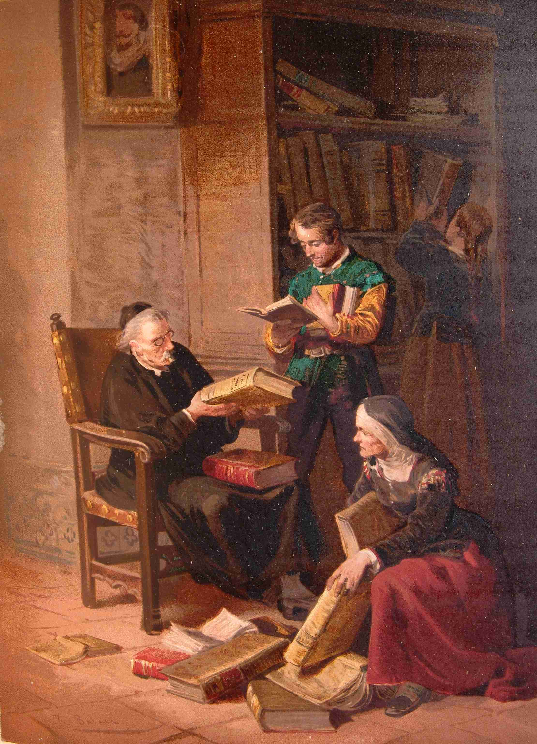 202_020_quijote_cap06